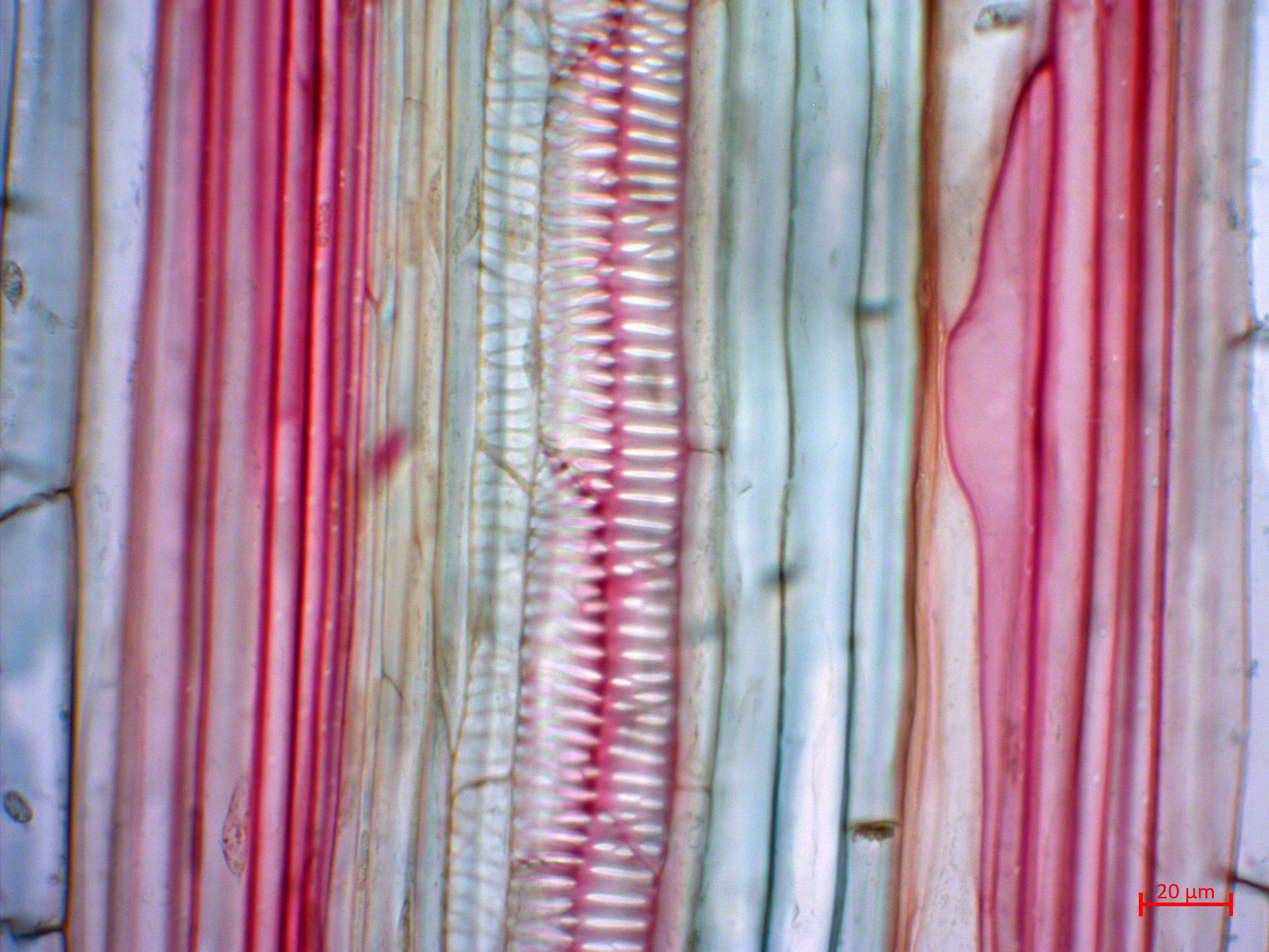 Zea_40x_2